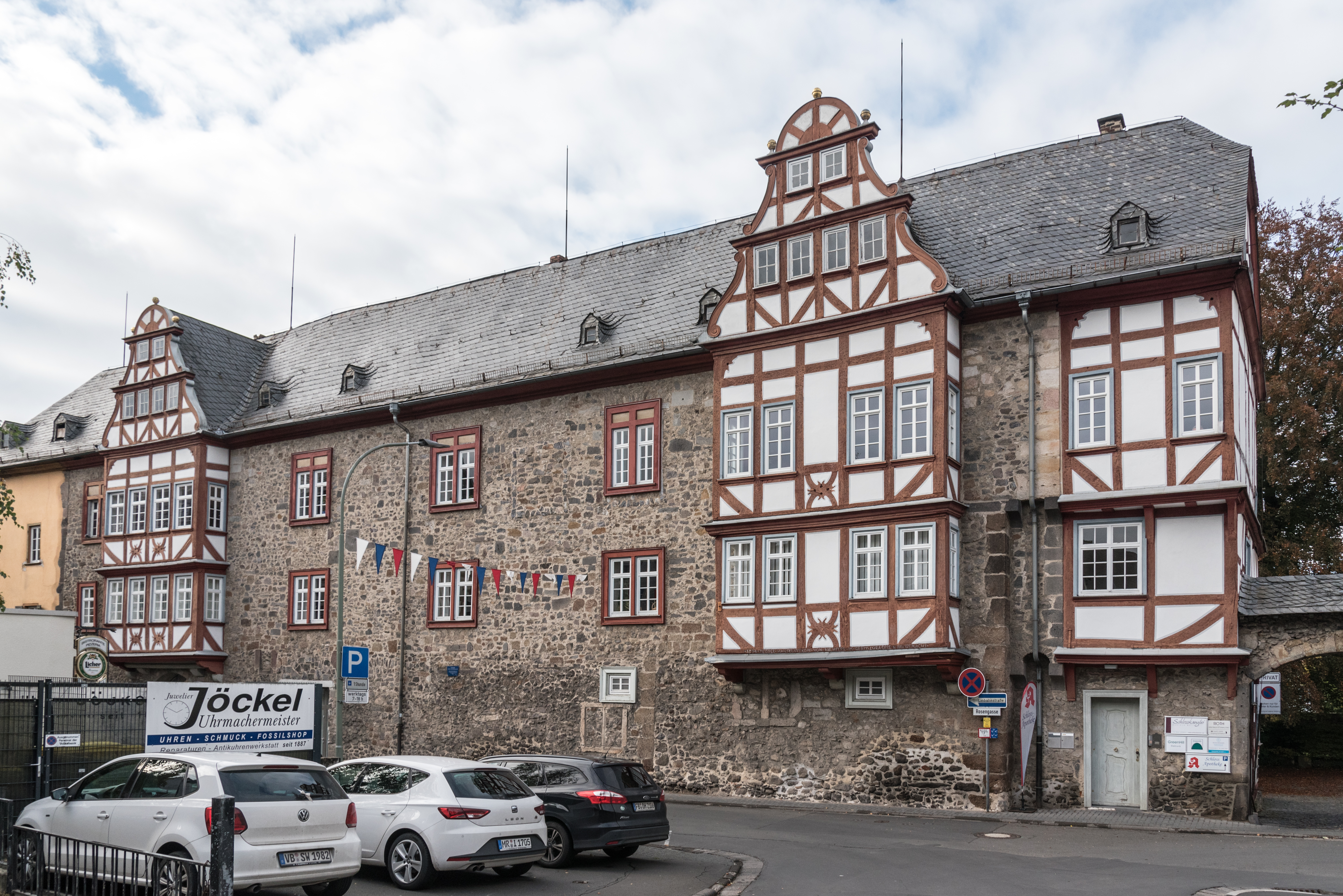 Grünberg, Rosengasse 4